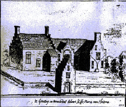 In print fan de Hoytema State út 1722, tekene troch Stellingwerf De tekening is yn it Printekabinet fan it Frysk Museum.